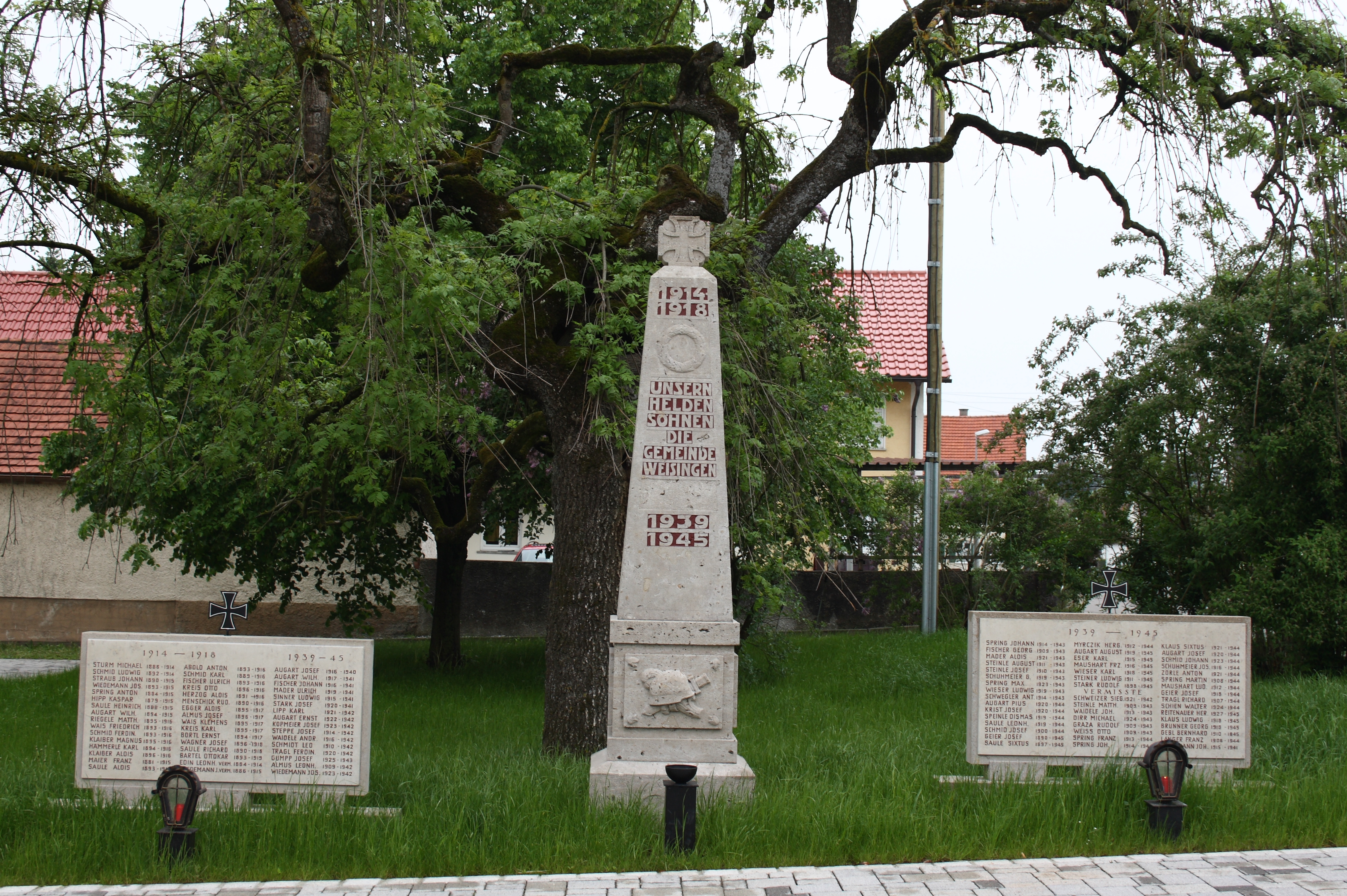 Kriegerdenkmal für die Gefallenen des Ersten und Zweiten Weltkriegs in Weisingen, einem Ortsteil von Holzheim im Landkreis Dillingen an der Donau (Bayern)